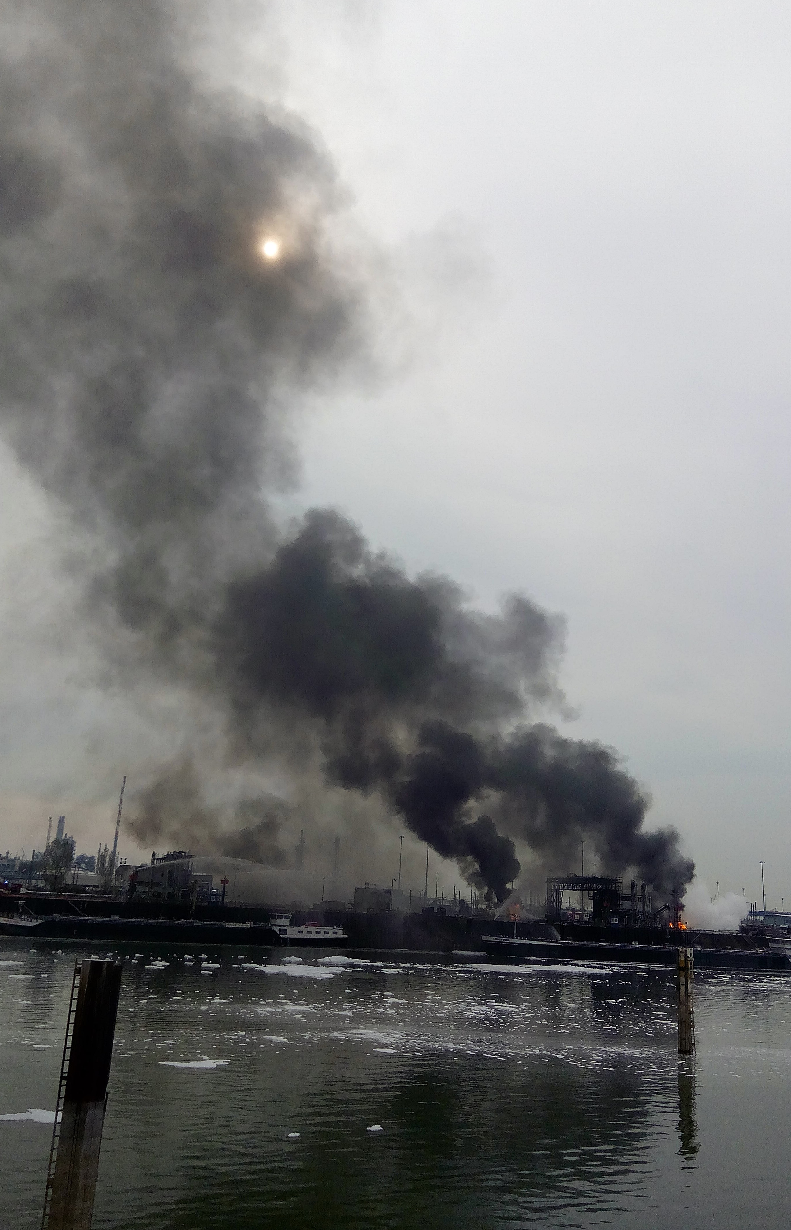 Unfallstelle am 17.10.2016, 13.19 h